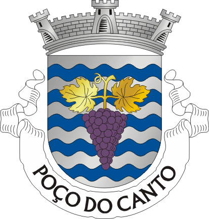 Brasão da freguesia do Poço do Canto